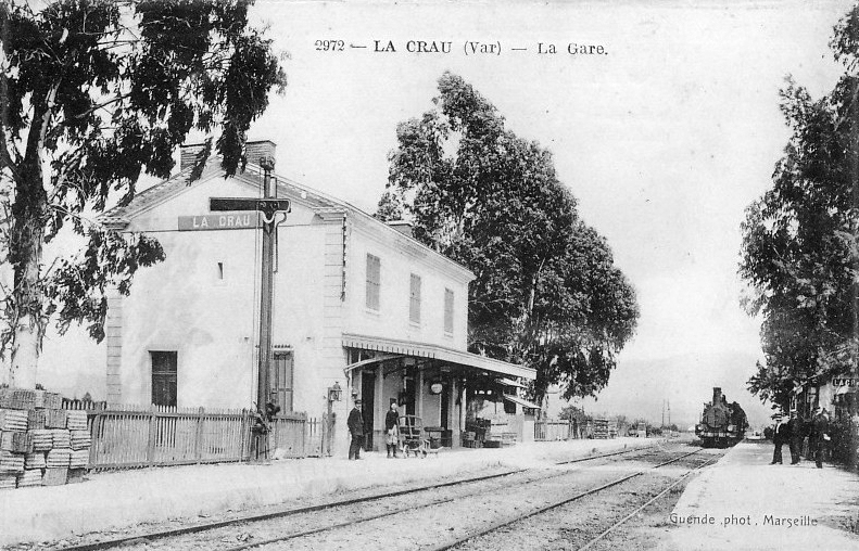 La gare de la Crau vers 1900. Les deux voies et les deux quais avec une desserte par un train vapeur.